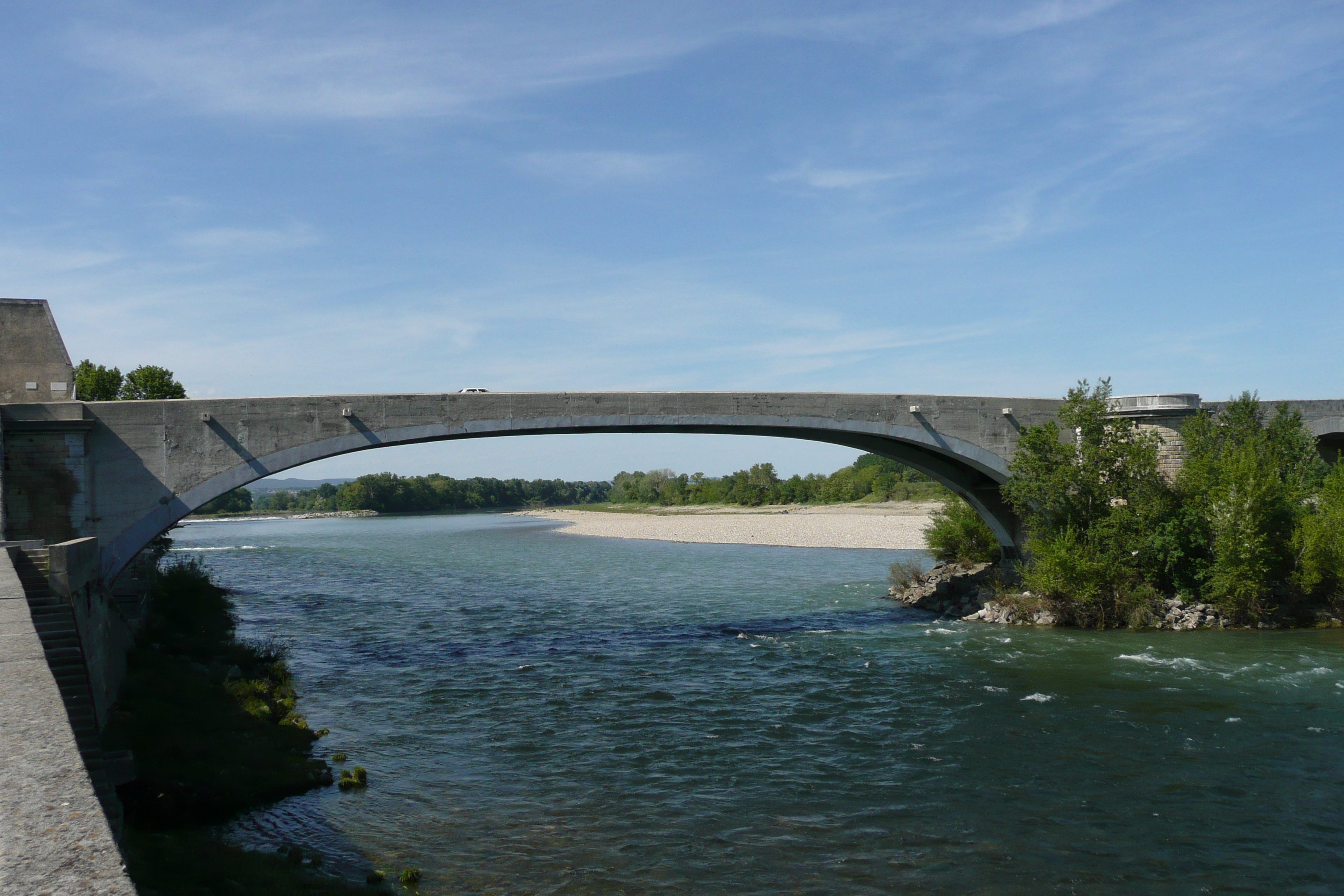 Détail du Pont du Rhône à Pont-Saint-Esprit.